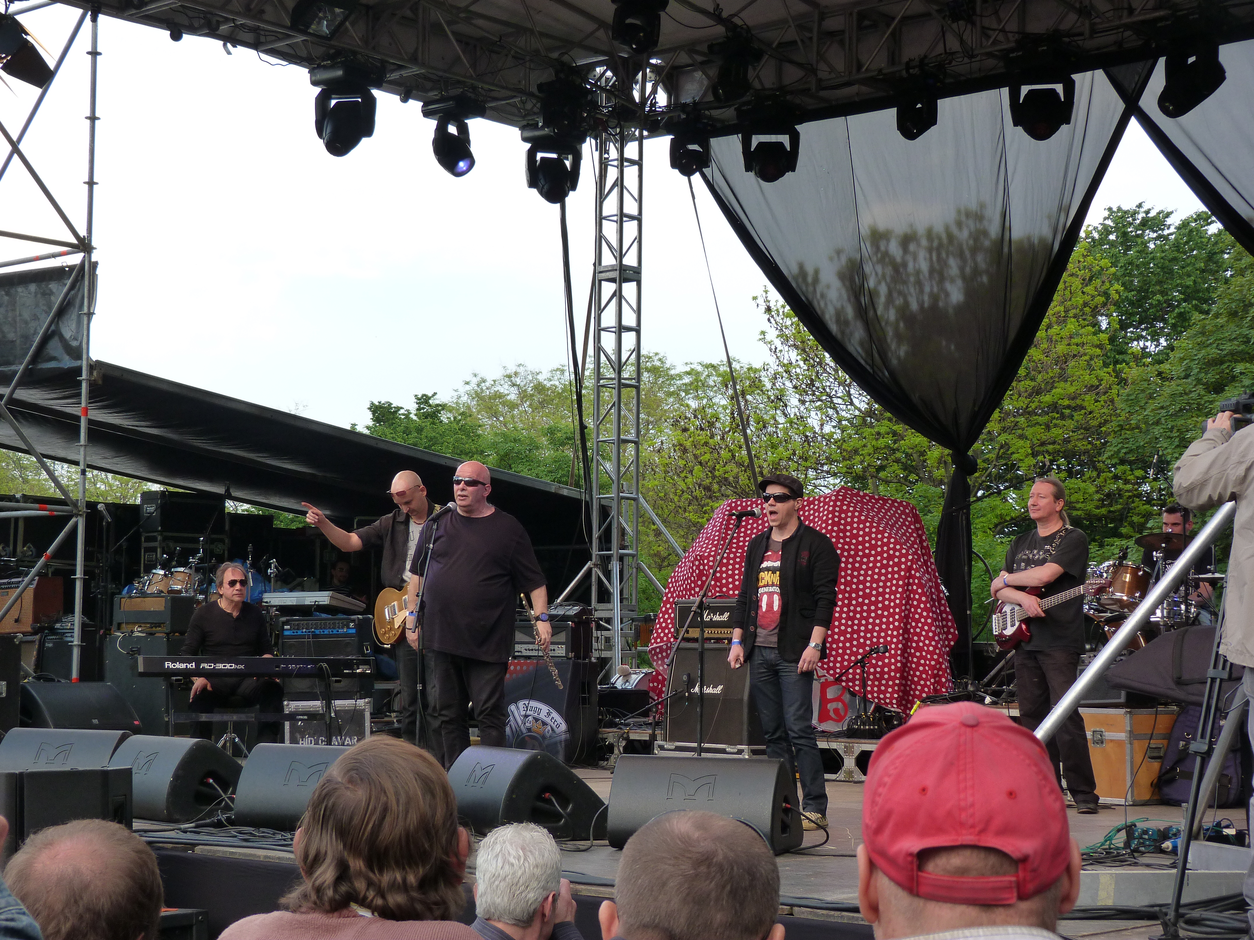 A felvétel 2014. május 1 -én csütörtökön készült Budapesten, a Tabánban. Az év évente szokásos koncerten mások mellett Török Ádám és a Mini, Nagy Feró és a Beatrice lépett fel. ©© Derzsi Elekes Andor, Budapest, 2014, A kép és filmfelvételek egészben, vagy részletekben másolását, bármilyen úton történő sokszorosítását és felhasználását a szerző ellenérték nélkül, jogutódjaira is kihatóan megengedi. Az engedély kiterjed a kereskedelmi célú hasznosításra is. Kéri azonban nevének feltüntetését a felhasználás során. A Metapolisz sorozat valamennyi képe és filmje Creative Commons alatti valamint kereskedelmi - for profit - célra is felhasználható. Ajánlott hivatkozás: Derzsi Elekes Andor: Metapolisz DVD line